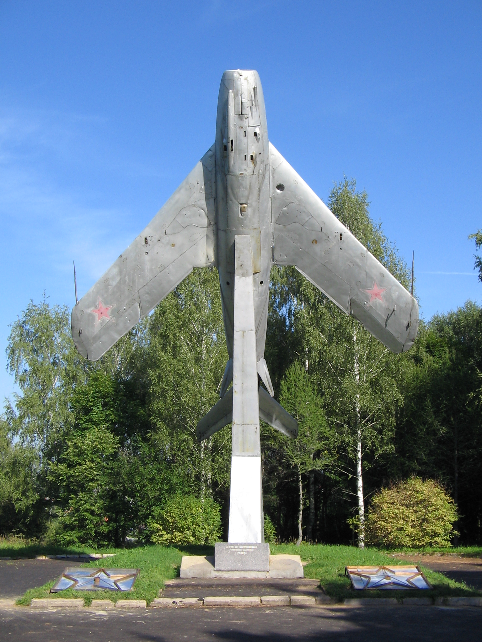 Памятник-самолёт МиГ-17 (Наро-Фоминск)